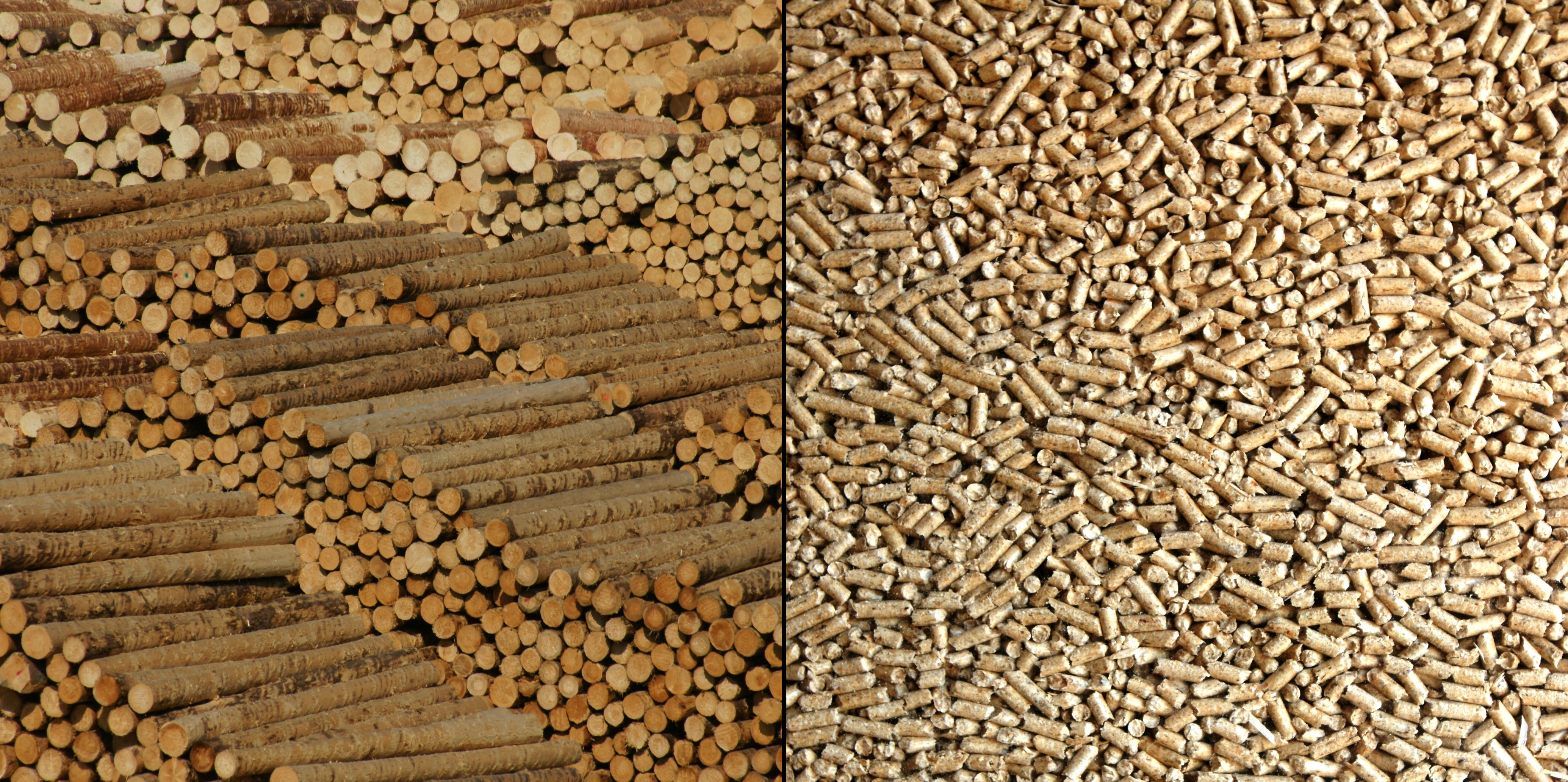 Holzlager und Holzpellets der Firma Binderholz in Fügen (Zillertal).